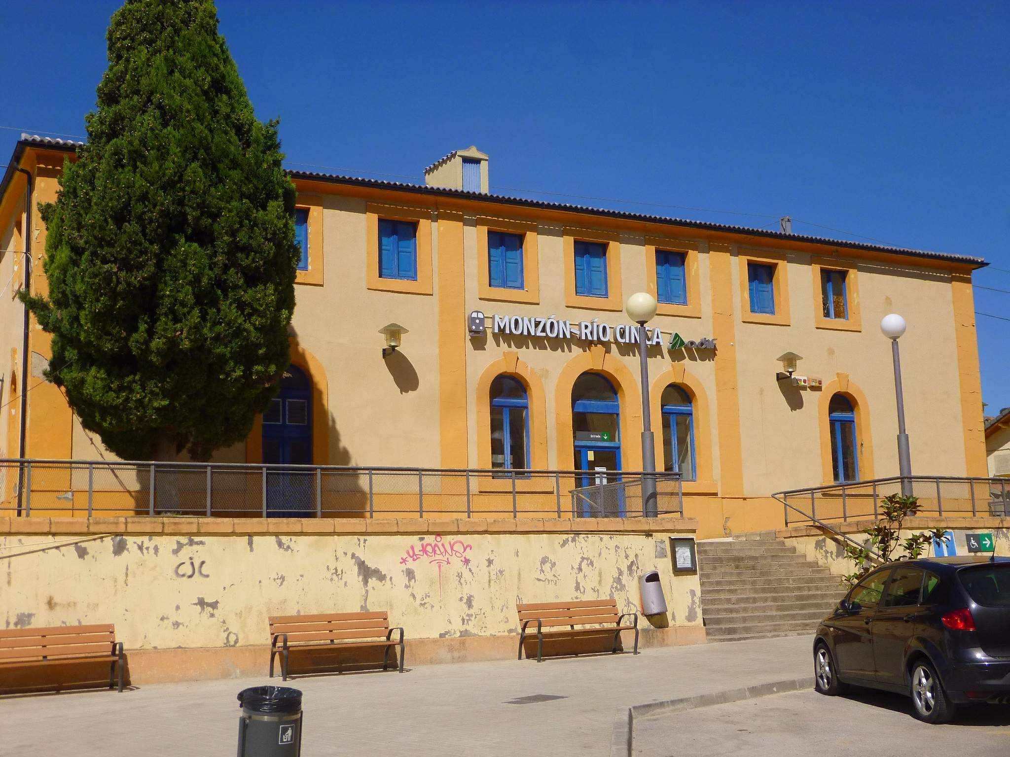 Monzón - Estación de tren de Monzón-Río Cinca